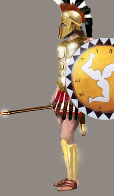 Selinous, Marzo 2008 Opera propria. Guerriero oplita ricostruito sommando ad un'immagine di uno dei bronzi di Riace la armatura pesante